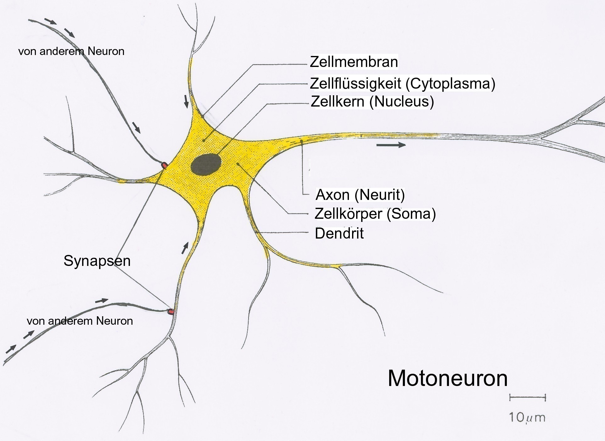 Motoneuron mit seinen Hauptbestandteilem